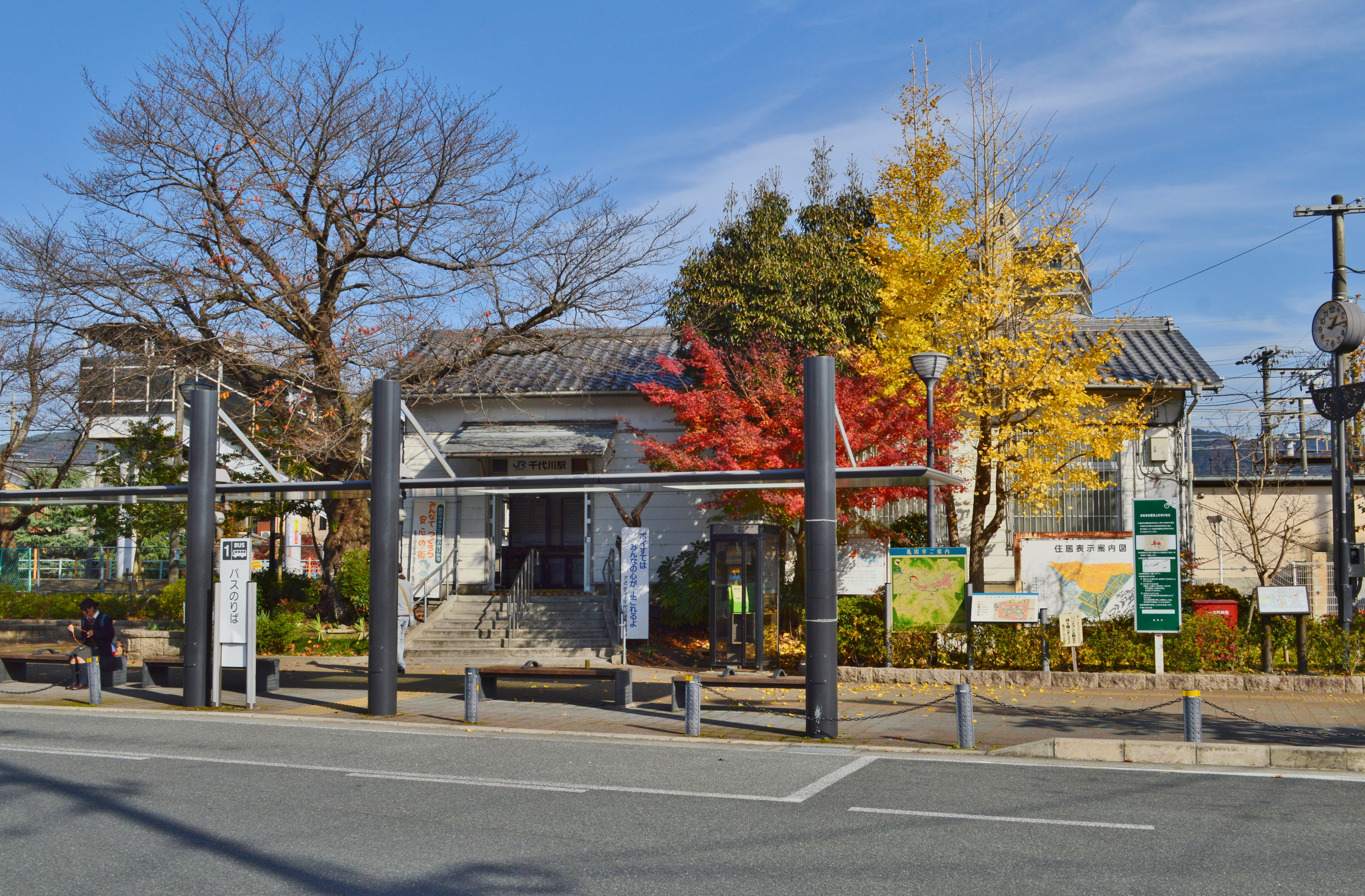 千代川駅 駅舎